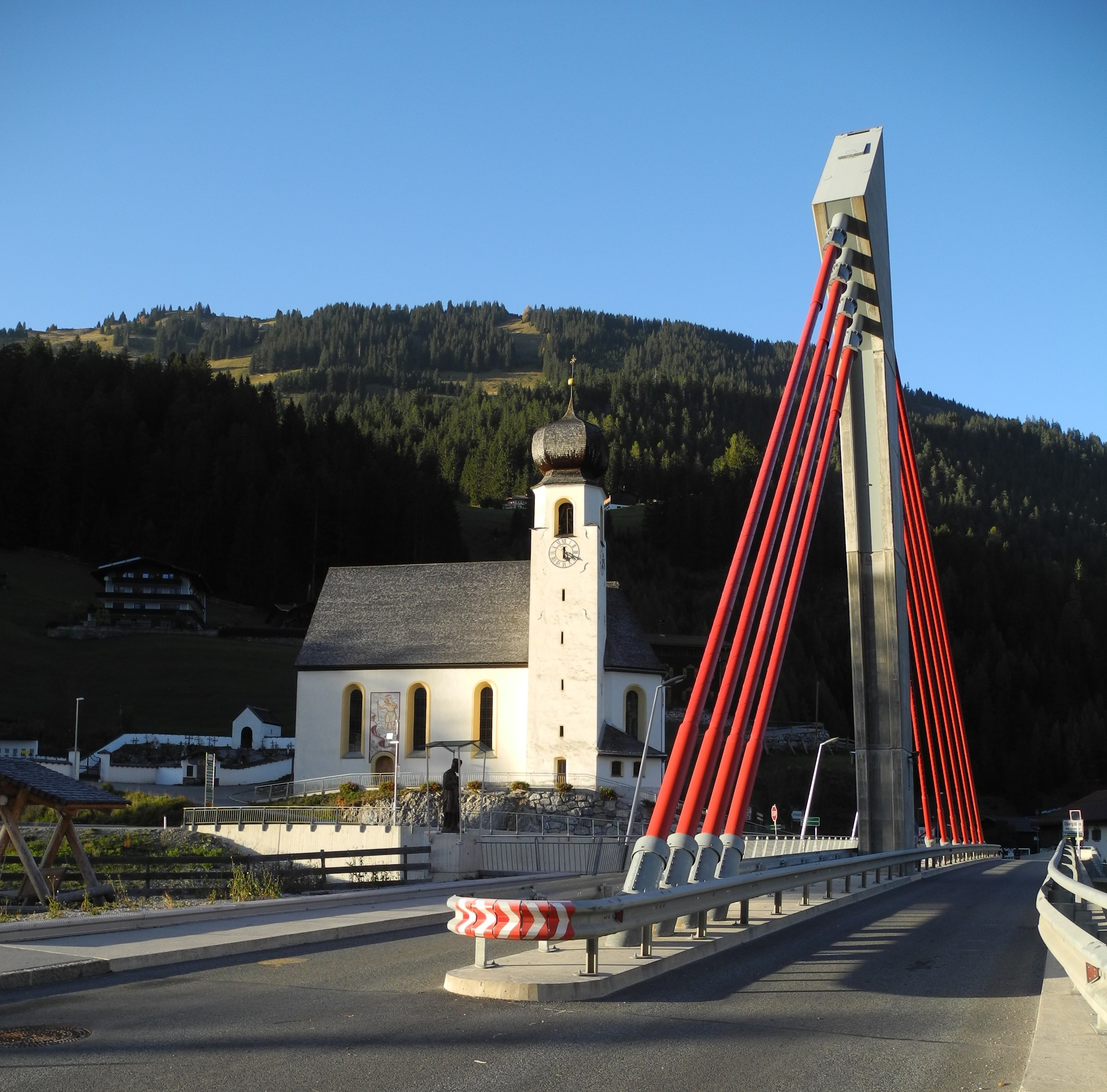 Bach - Kirche mit Brücke im Tiroler Lechtal